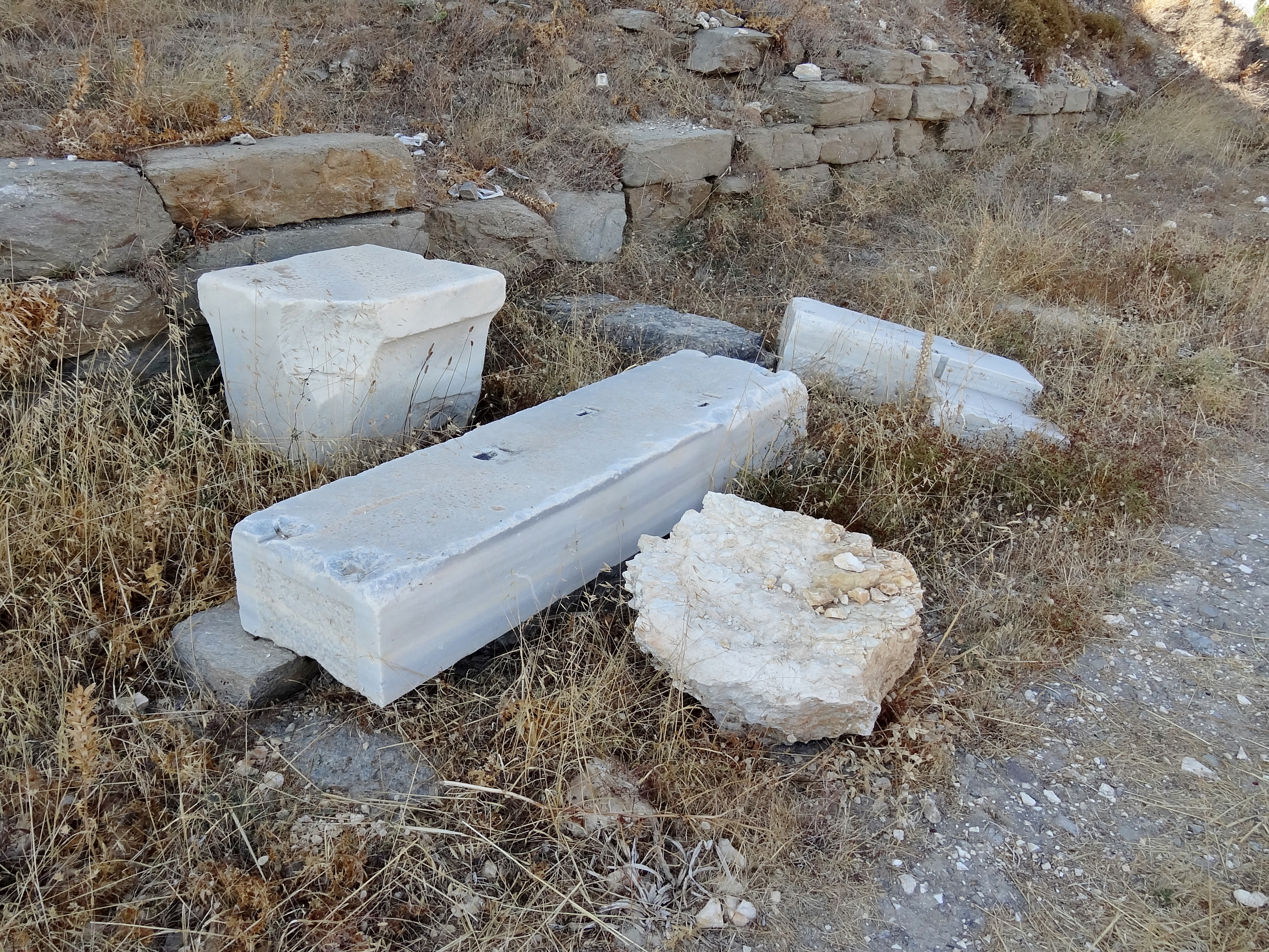 Asklepieion in Parikia auf Paros, Kykladen, Griechenland